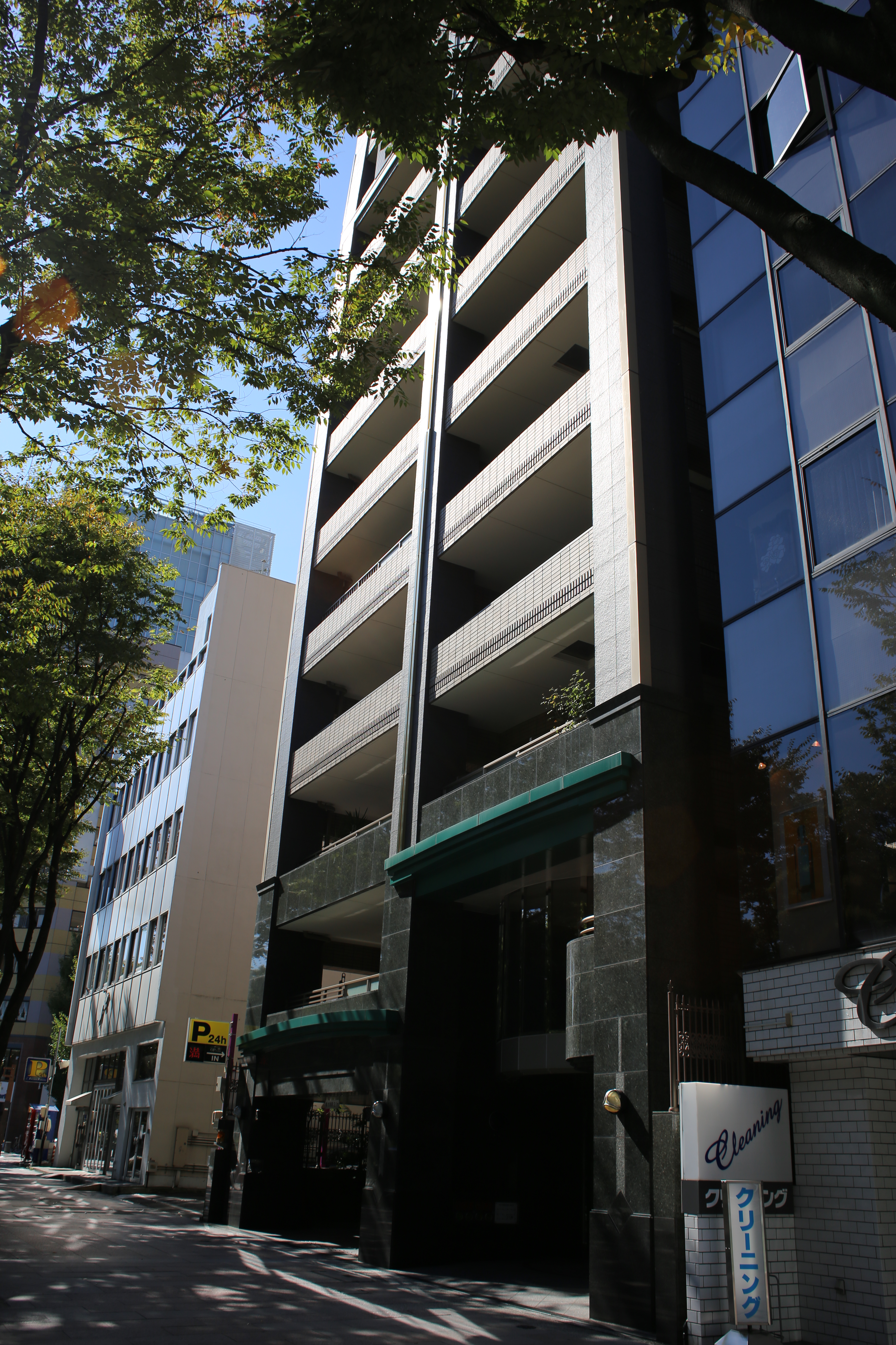 名古屋市中区丸の内三丁目のライオンズヒルズ久屋を東側公道北側より撮影